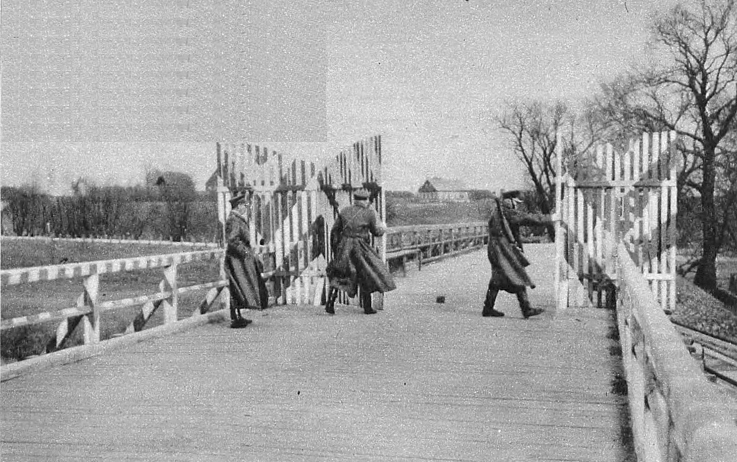 Symboliczne otwarcie polsko-litewskiego przejścia granicznego na moście na rzece Mereczance.